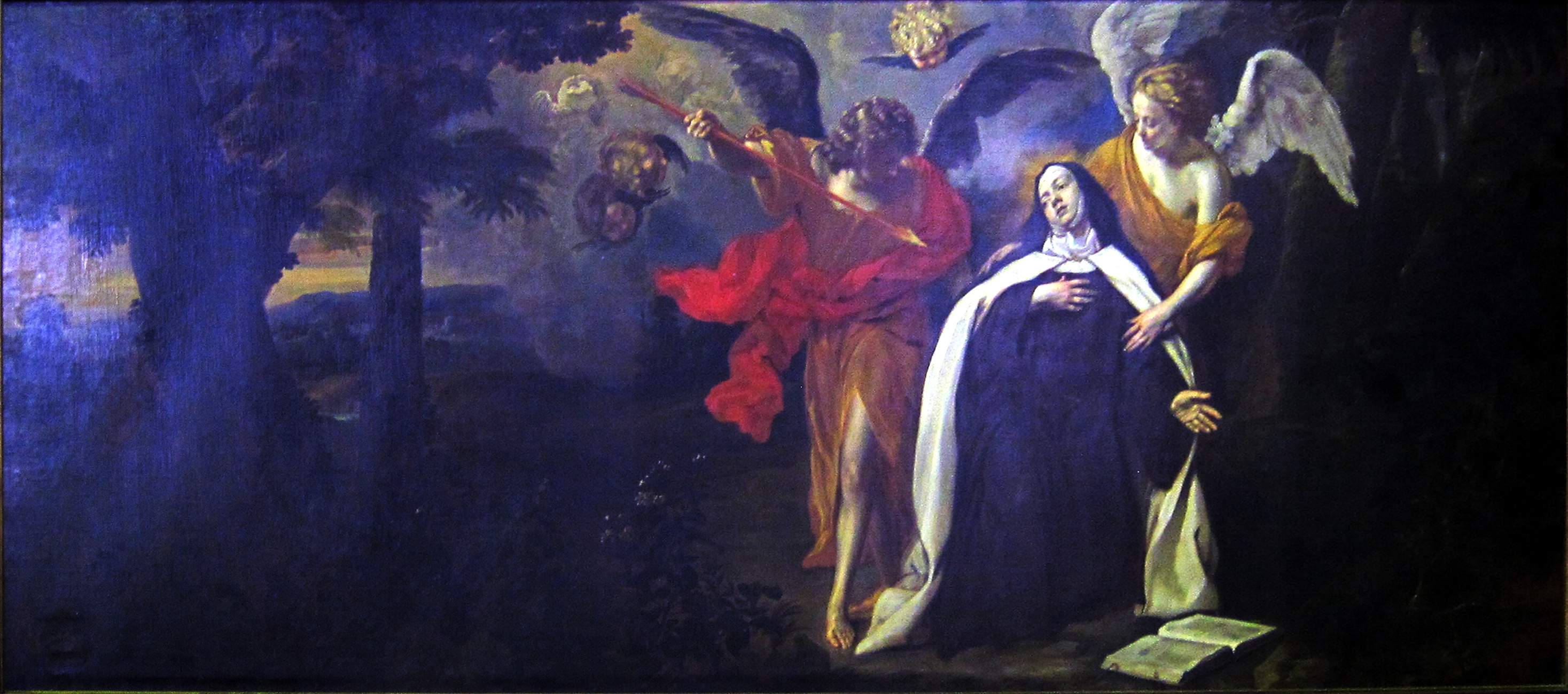 La Transfixion de sainte Thérèse d'Avilatitle QS:P1476,fr:"La Transfixion de sainte Thérèse d'Avila" label QS:Lfr,"La Transfixion de sainte Thérèse d'Avila"